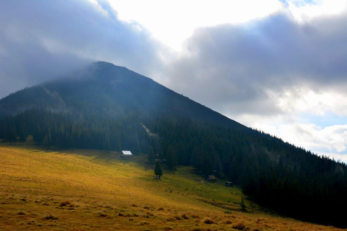 «Горгани», Надвірнянський район, Бистрицька та Зеленська сільські ради